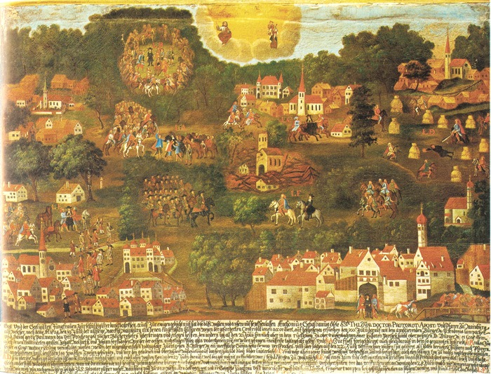 Oefele-Votivbild zu den Geschehnissen im Spanischen Erbfolgekrieg rund um Mainburg.